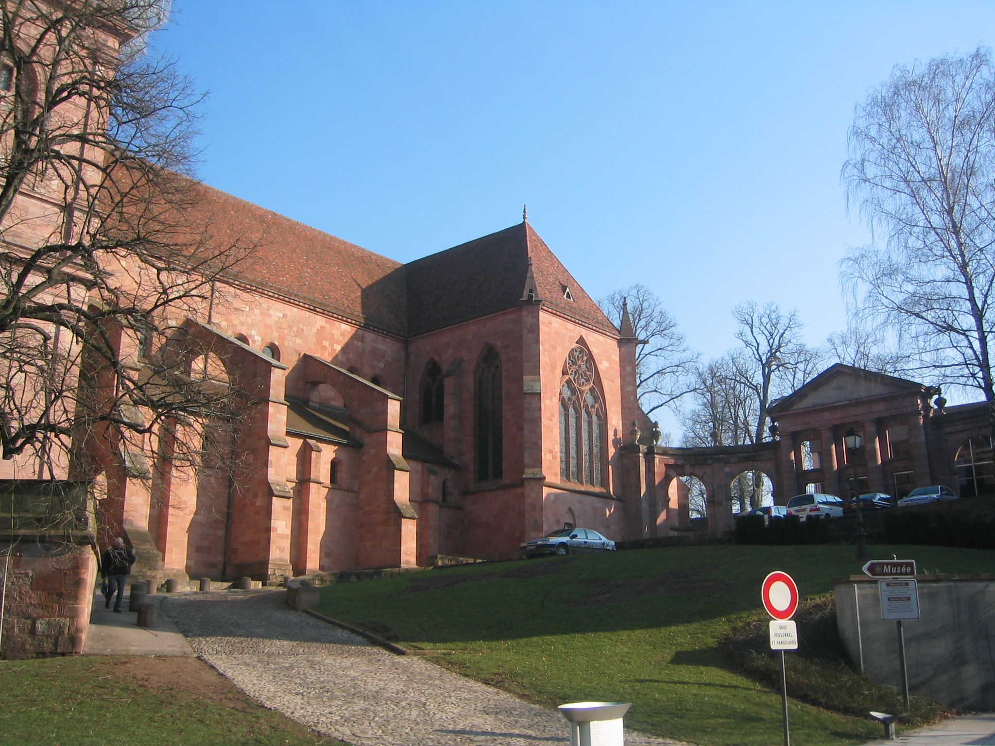 Saint-Dié-des-Vosges : Cathédrale